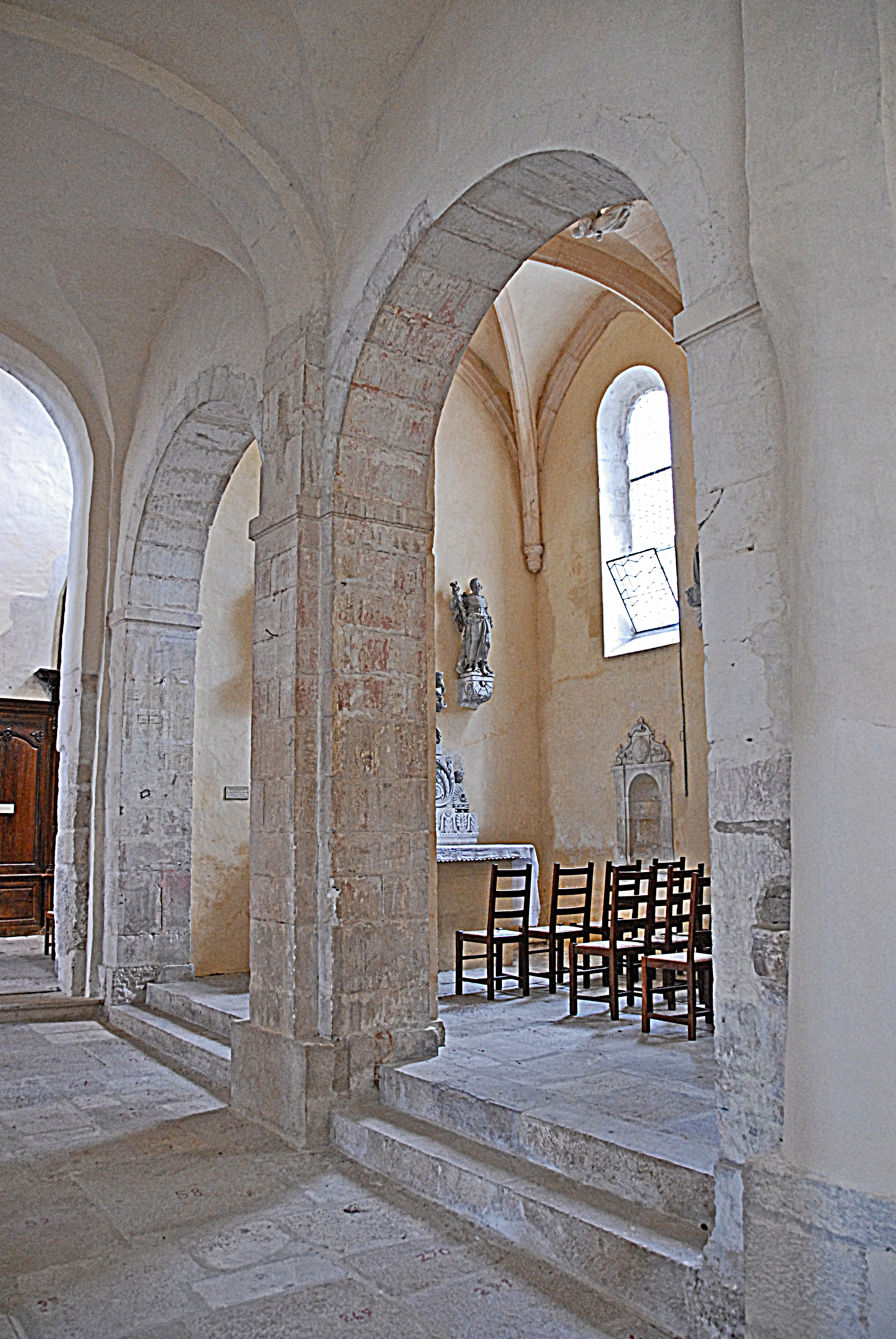 Châtillon-s-S, Heiligkreuzkap. aus Seitenschiff